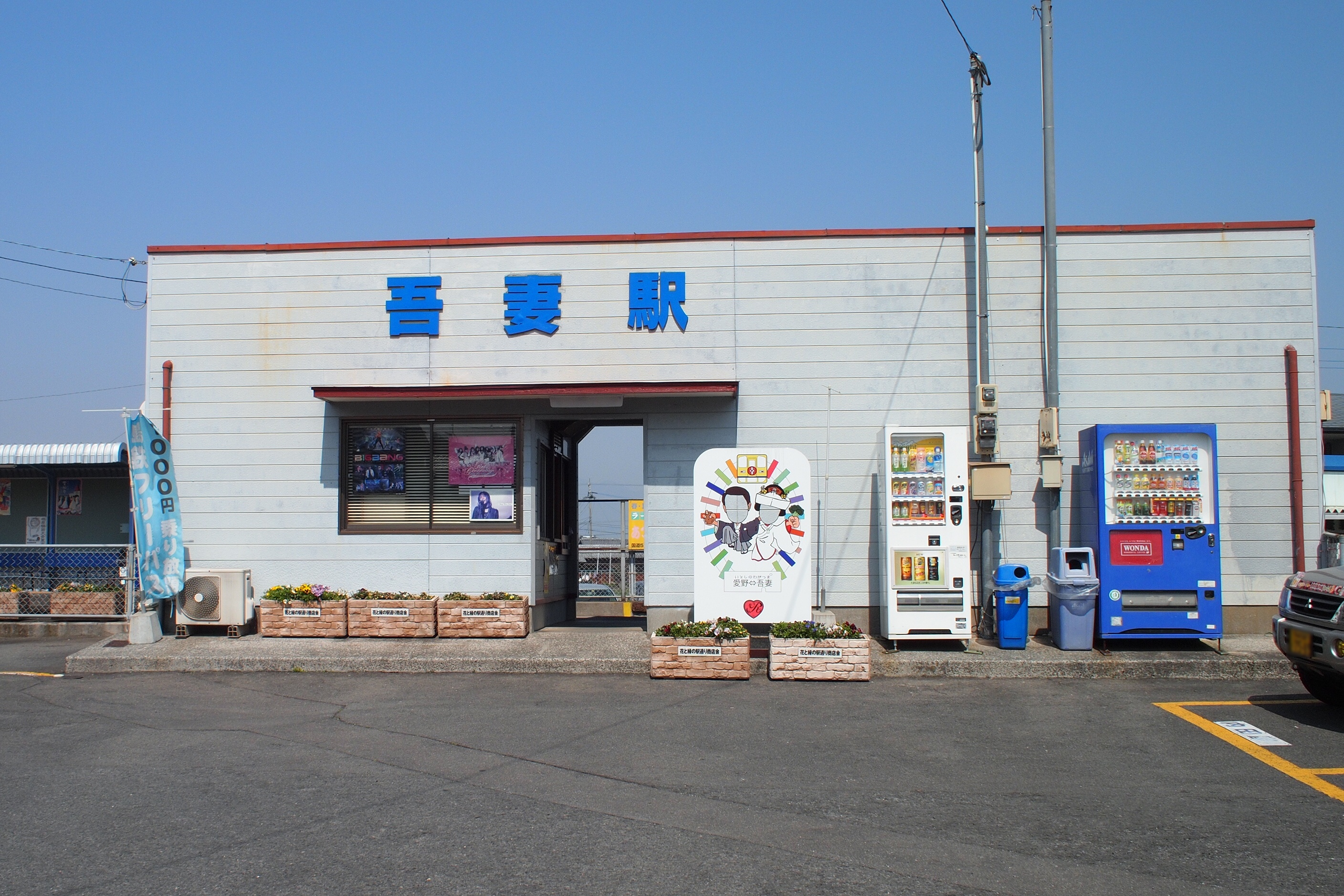 島原鉄道の吾妻駅舎